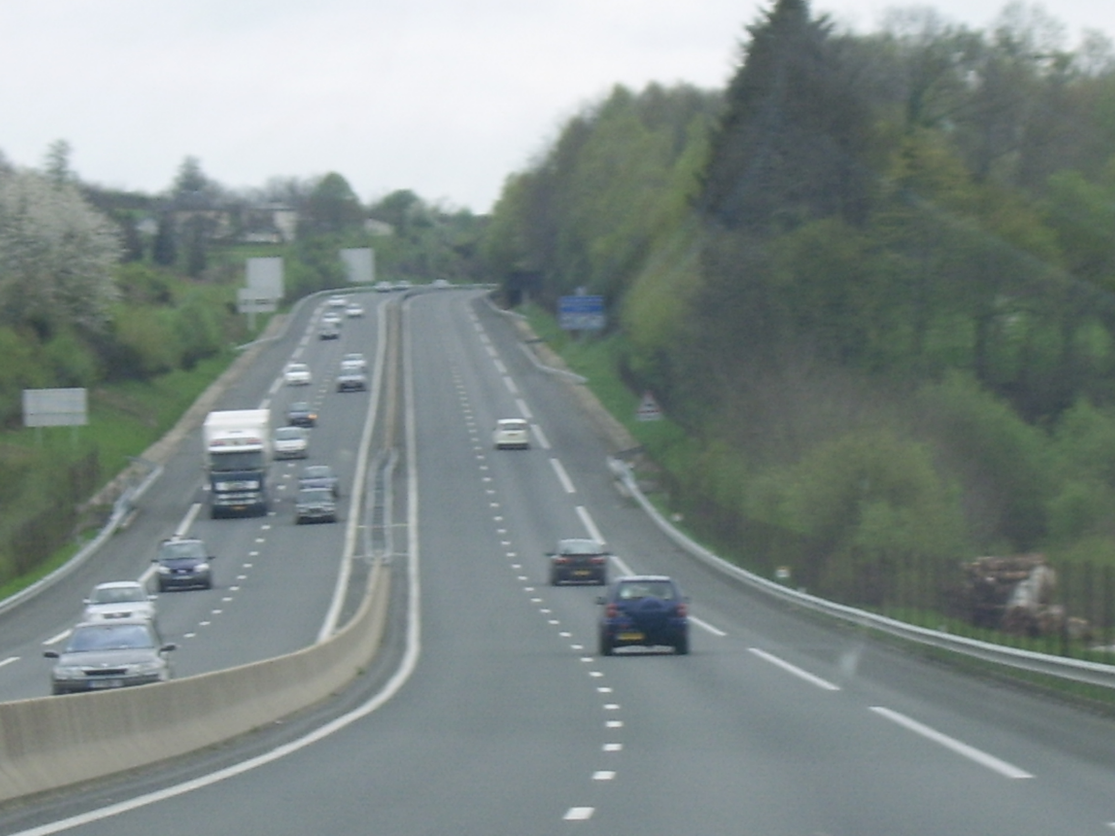 Vue de l'autoroute A20 en Corrèze.